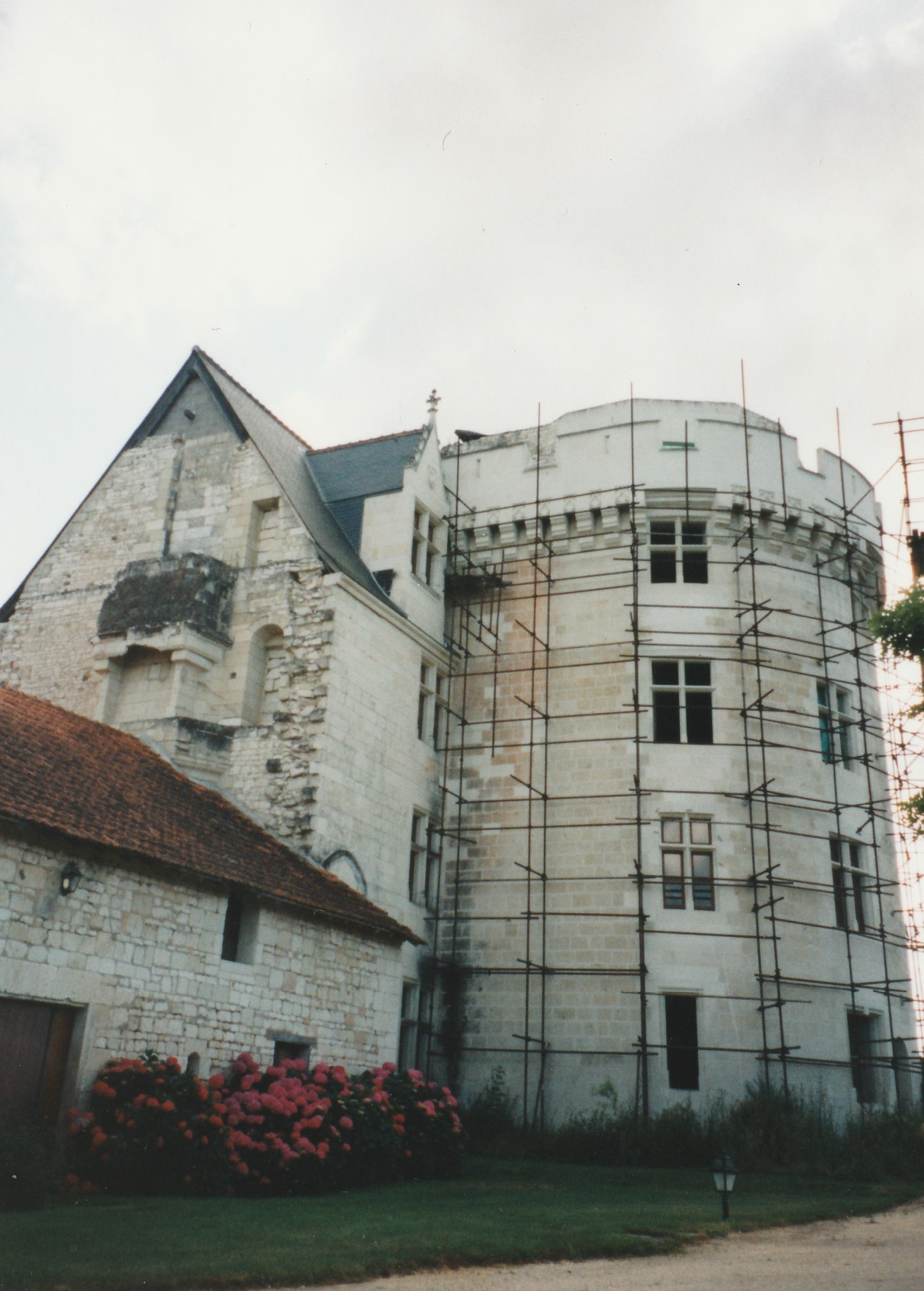 Cette photo prise en 1998 montre la tour semi-circulaire en cours de rénovation, 1998.